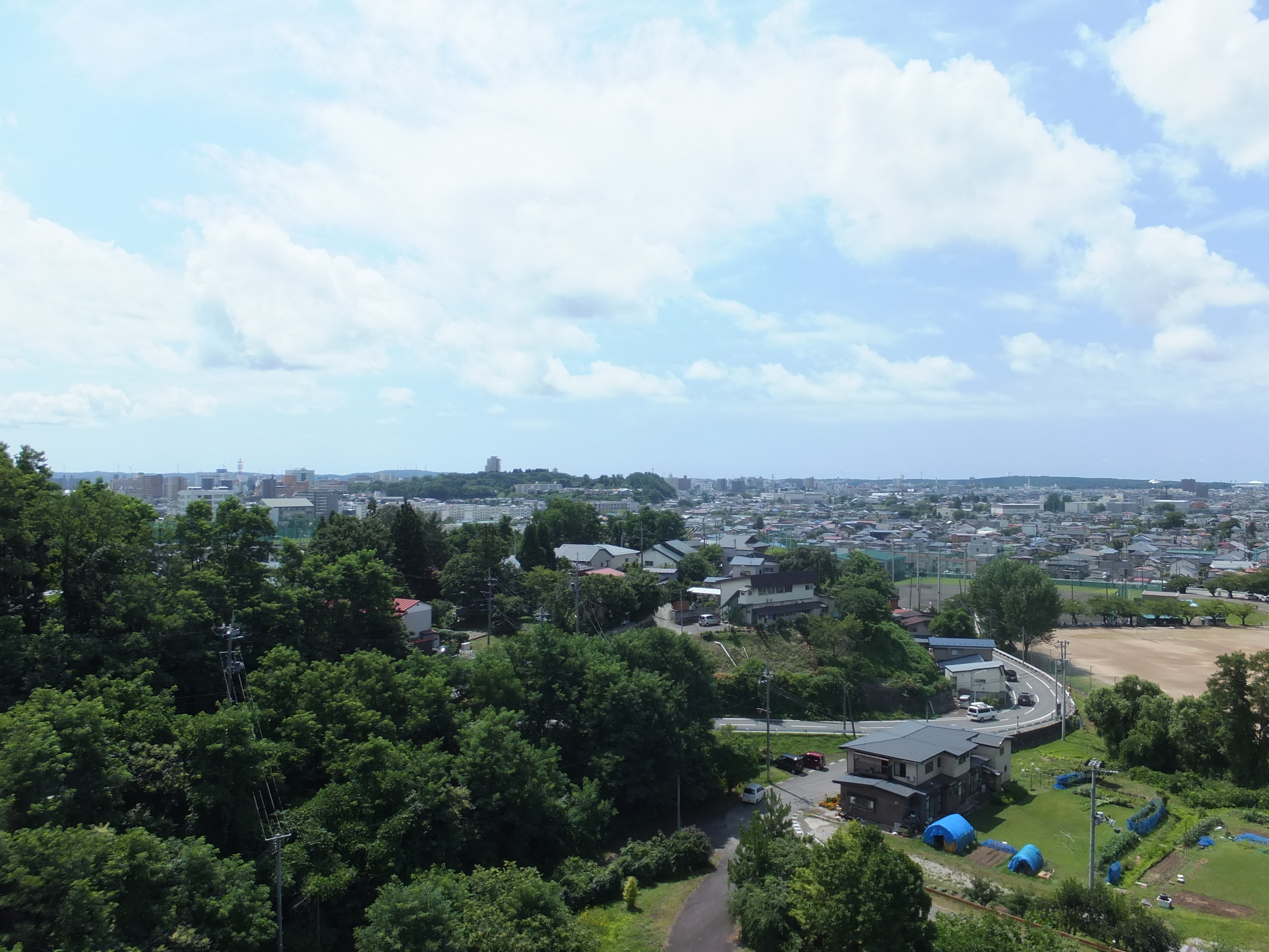 秋田県道41号秋田昭和線（横山金足線）手形山大橋からの眺め。画面右端のグラウンドは秋田県立秋田高等学校のグラウンド